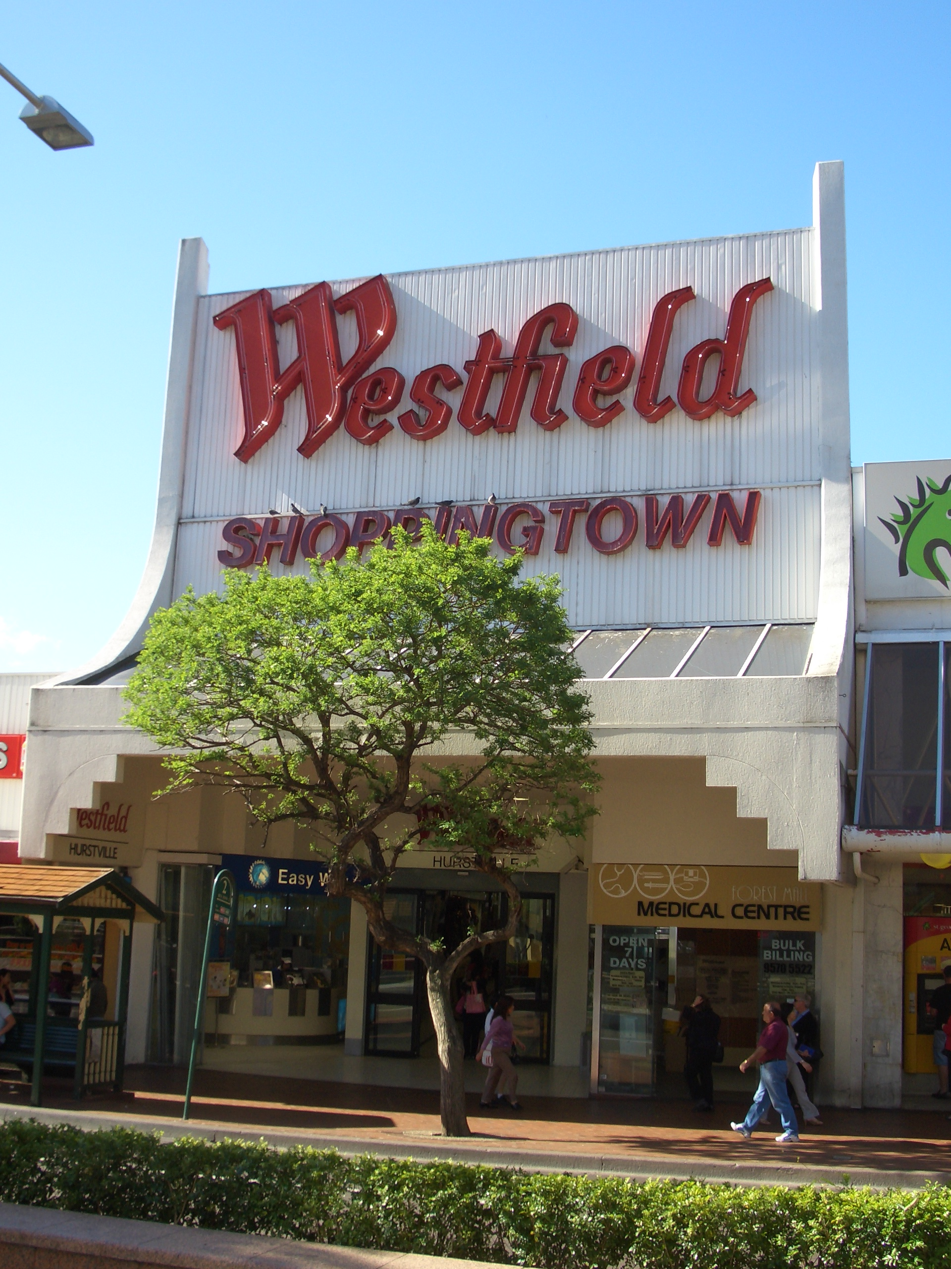 Westfields Hurstville, Forest Road, Sydney